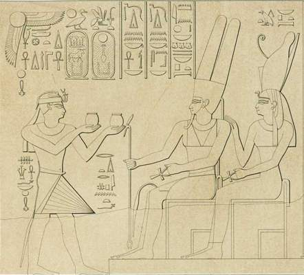 King Shabaka, Amun-Ra and Mut.